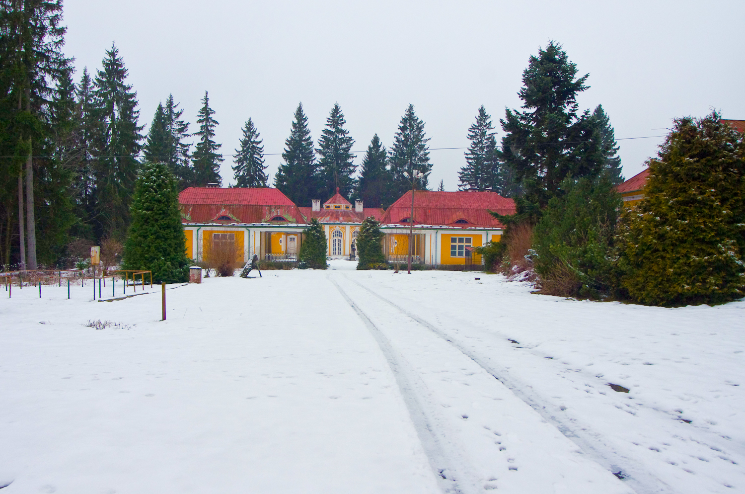 Zámek - zámeček Favorit Šindelová, Šindelová 87